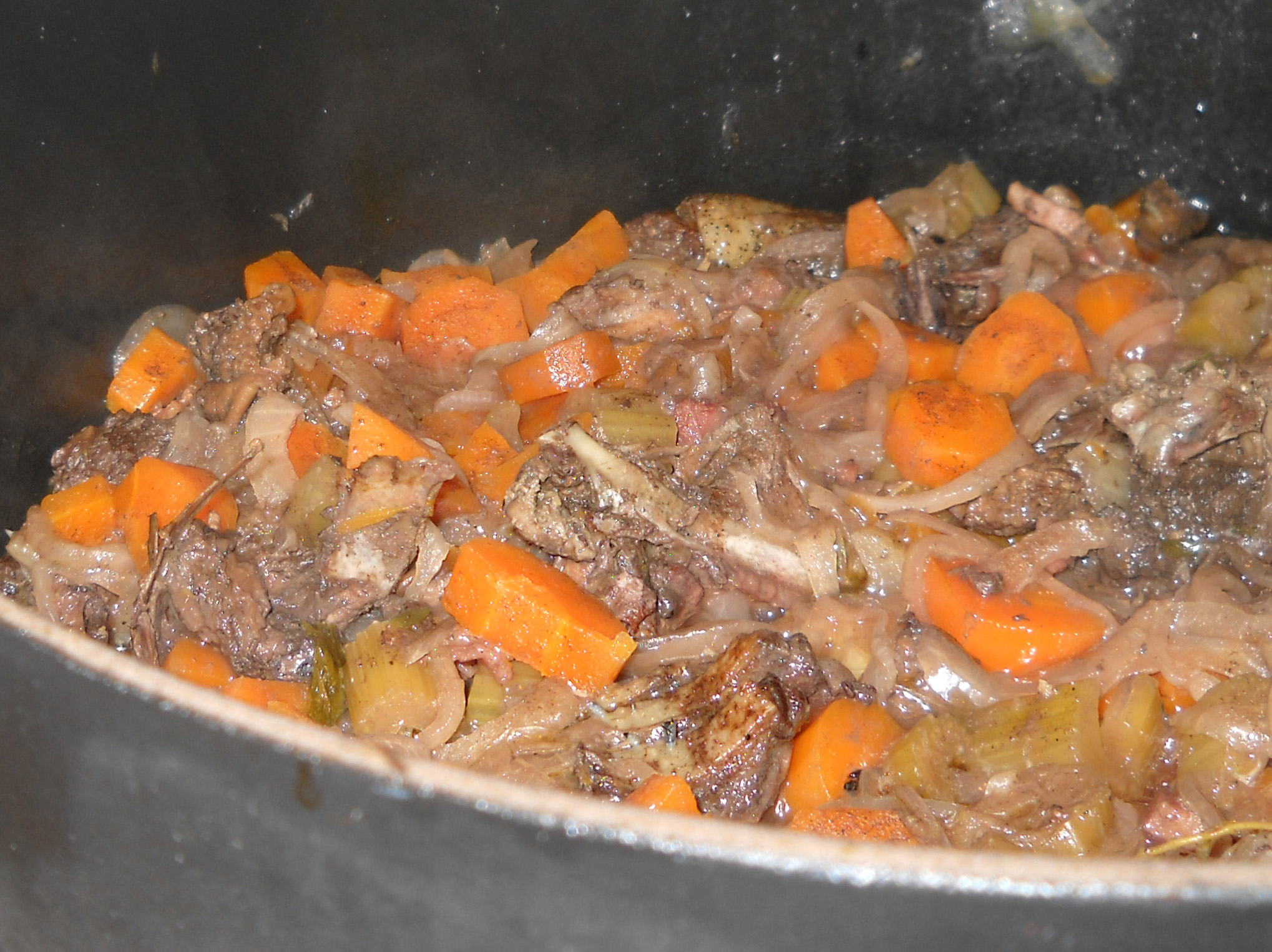 Salmis chasseur de Jacqueline : vue de la mirepoix et des carcasses